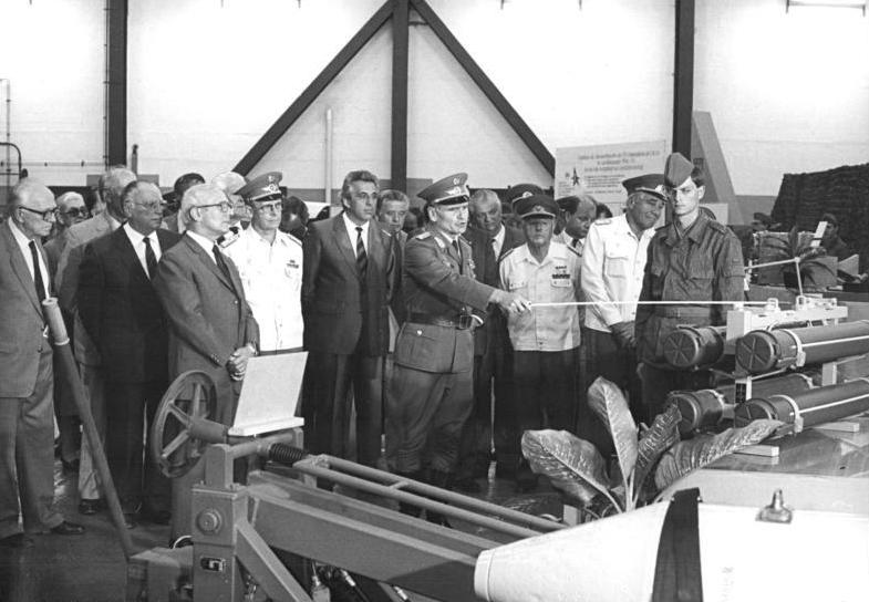 DDR, NVA-Truppenbesuch, Honecker ADN-ZB Mittelstädt 29.8.85 DDR: Truppenbesuch- Der Generalsekretär des ZK der SED und Vorsitzender des Staatsrates der DDR, Erich Honecker, Vorsitzender des Nationalen Verteidigungsrates der DDR, besichtigte die Halle der Kontroll-und Reparaturstaffel des Jagdfliegergeschwaders "Fritz Schmenkel". Generalmajor Ehrenfied Ullmann, Stellvertreter des Chefs der Luftstreitkräfte-Luftverteidigung (M.), gab Erläuterungen. vlnr Horst Sindermann, Kurt Hager, Erich Honecker, Generaloberst Wolfgang Reinhold, Egon Krenz, Werner Walds (verdeckt), Generalmajor Ehrenfried Ullmann, Werner Krolikowski, Armeegeneral Erich Mielke, Wolfgang Herger (verdeckt), Armeegeneral Heinz Hoffmann.